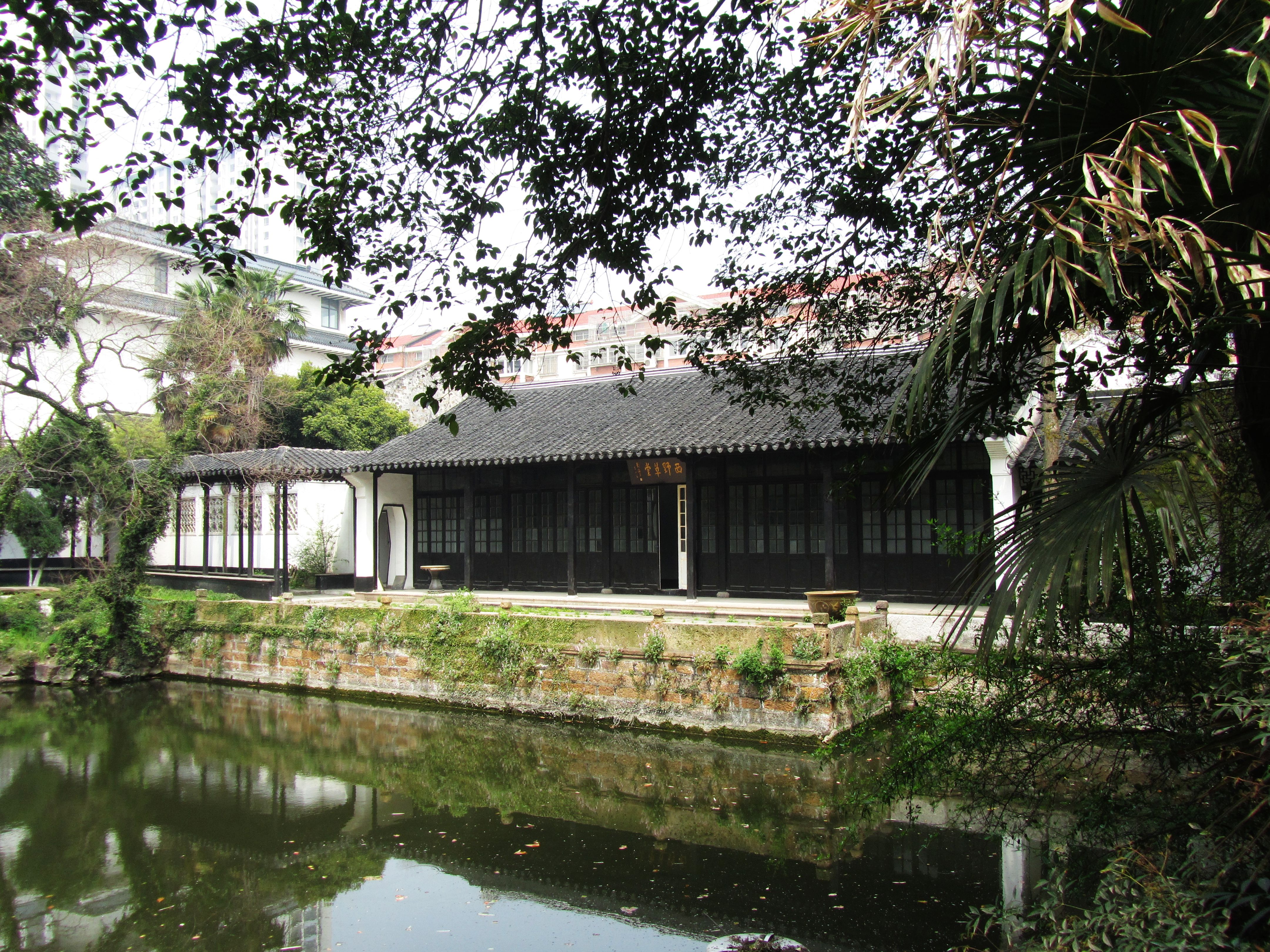 常州近园内主体建筑西野草堂。